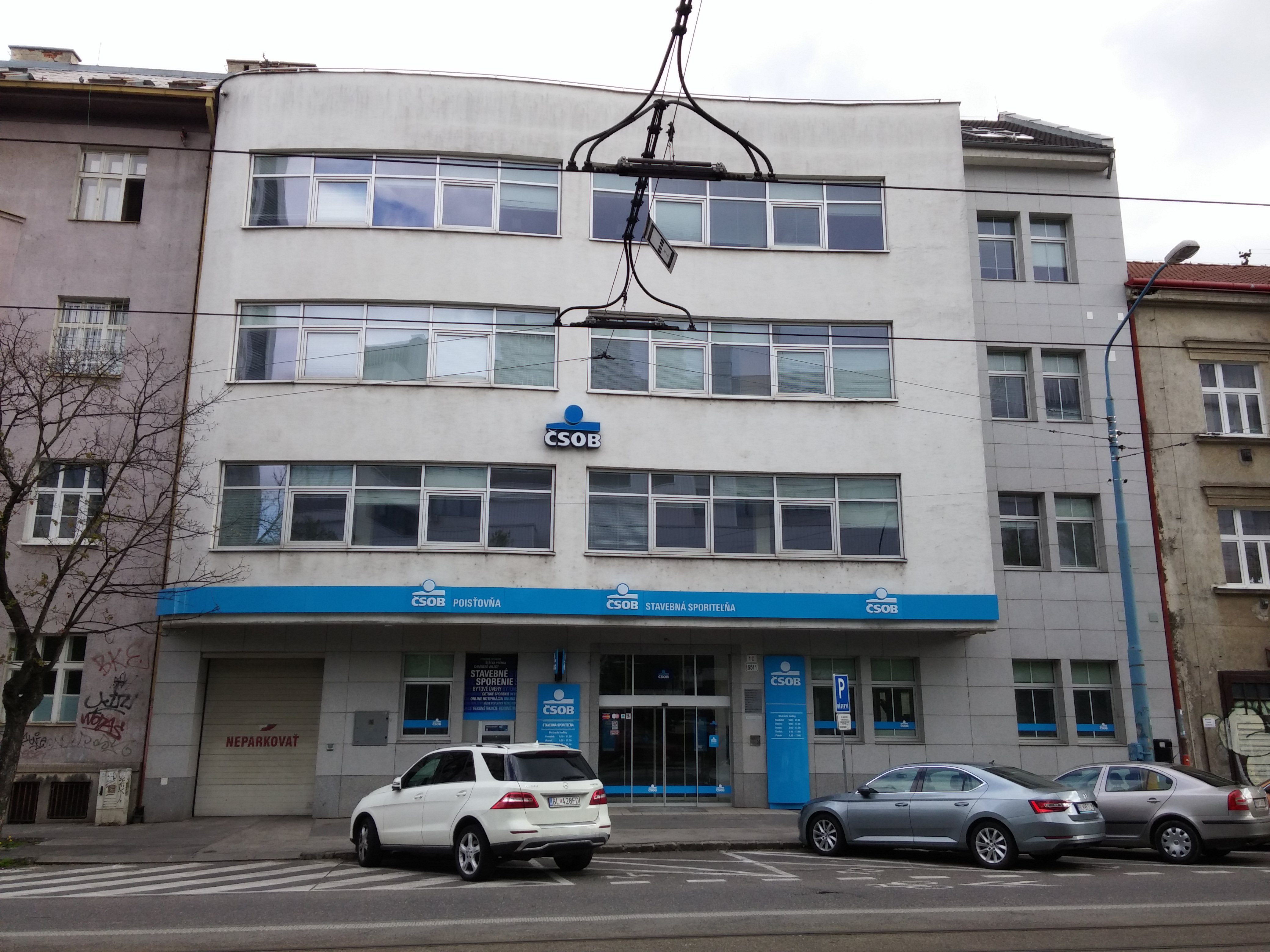 Radlinského 10, Staré Mesto, Bratislava